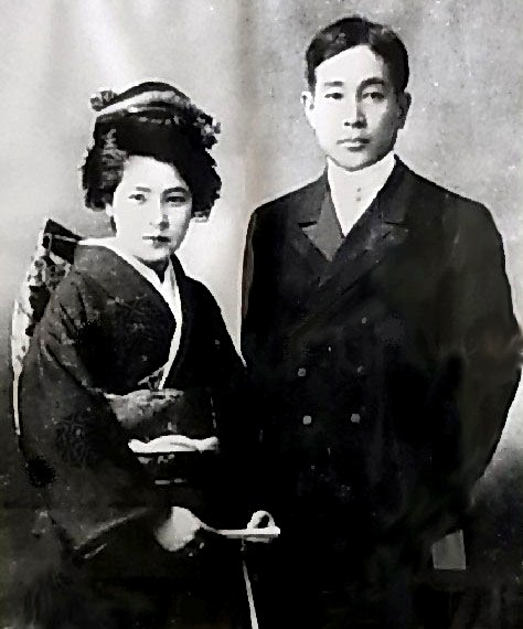 有島武郎と妻の安子